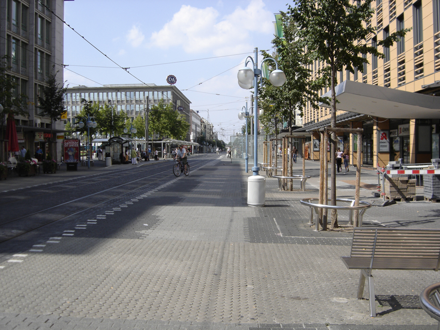 Mannheim Mannheim - Blick aus den Planken in Richtung Paradeplatz.